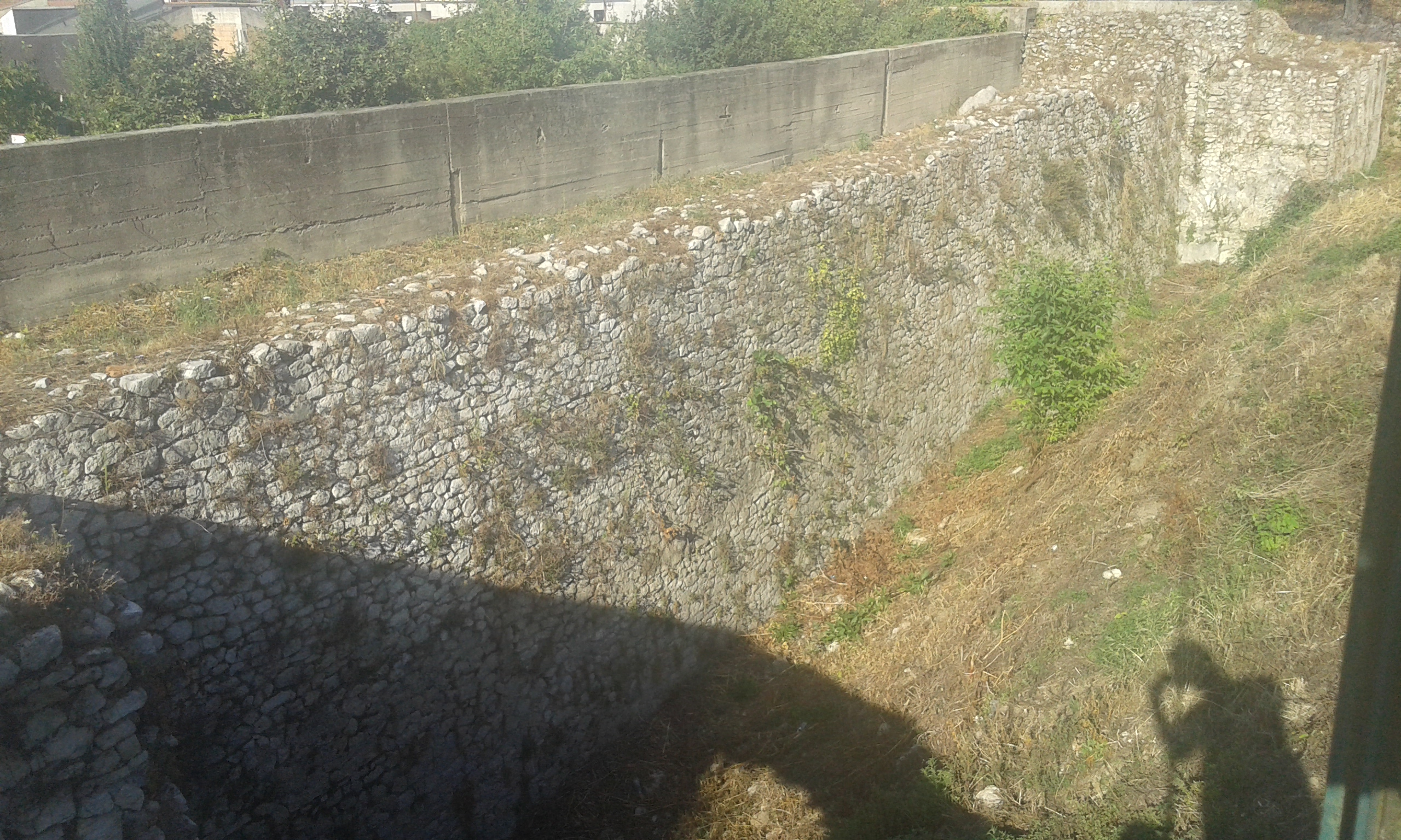 Tratto delle mura dell'antica Nuceria